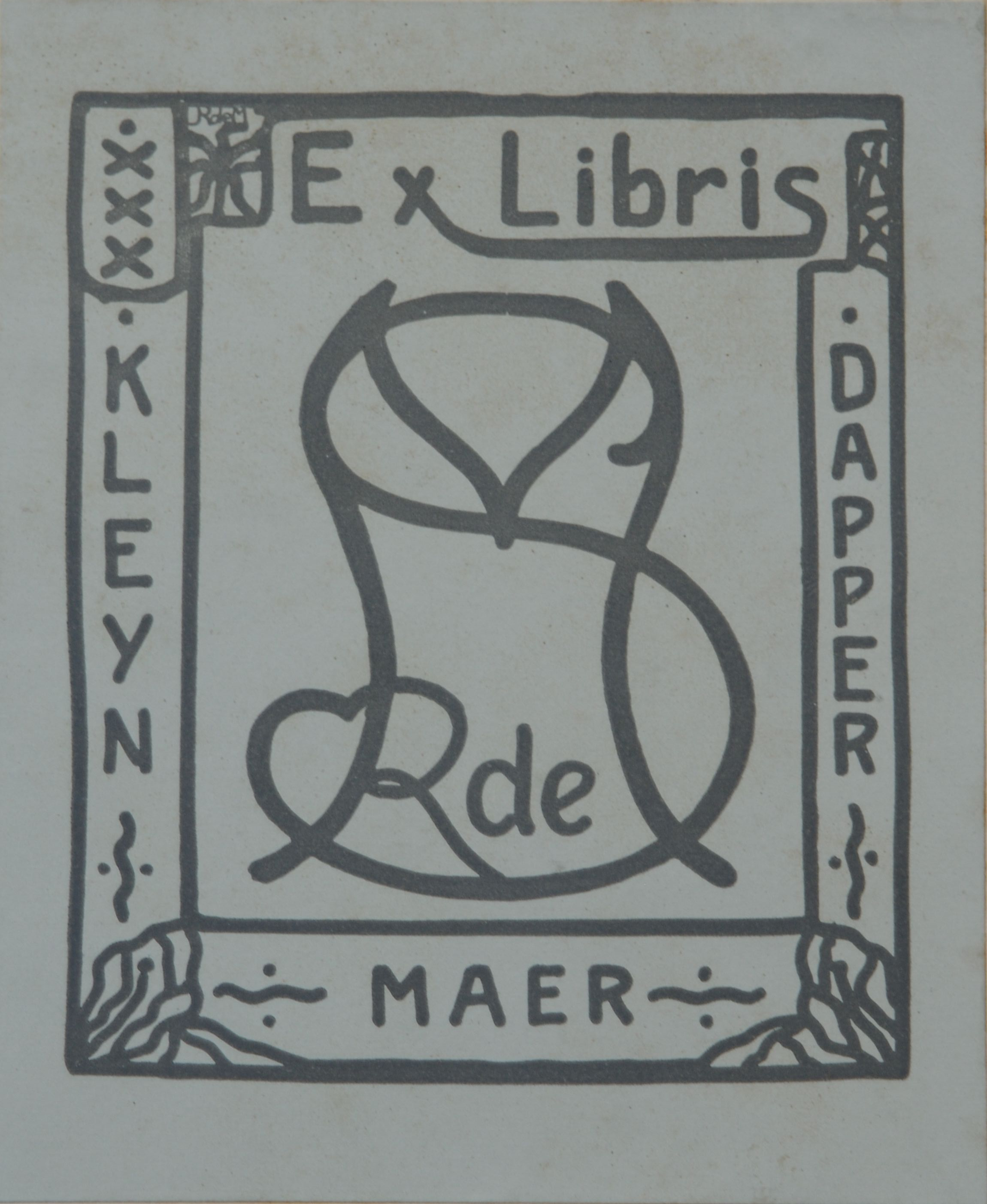 Ex Libris van Salomon (Monne) Rodrigues de Miranda (1875-1942) met zijn monogram en zijn motto 'kleyn maer dapper'.